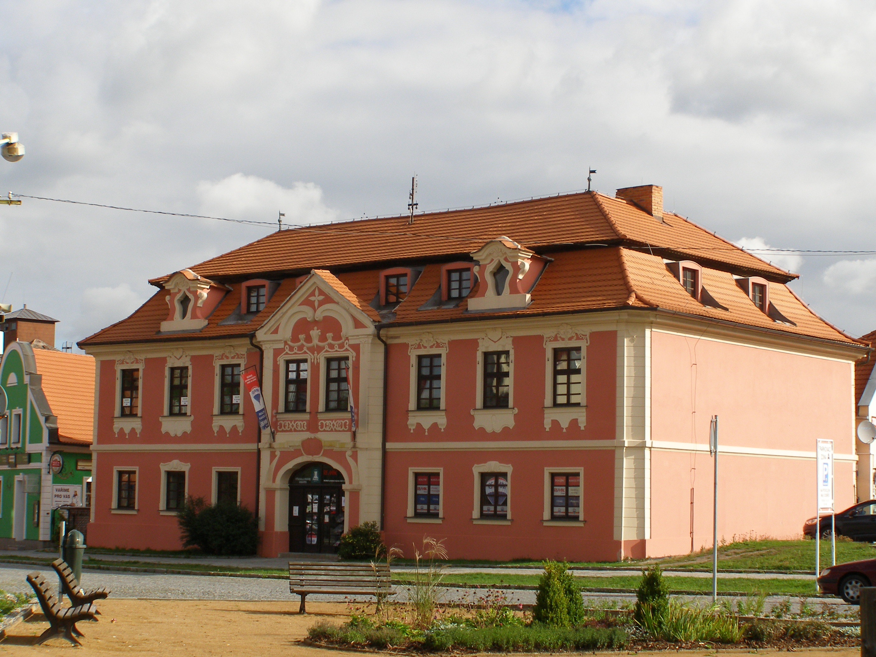 Kopáčkův dům, Mírové nám. 103, Dobříš